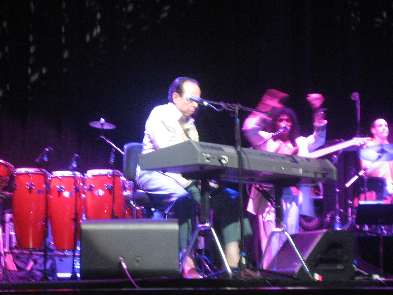 Sérgio Mendes @ Club Nokia 11.29.08 005